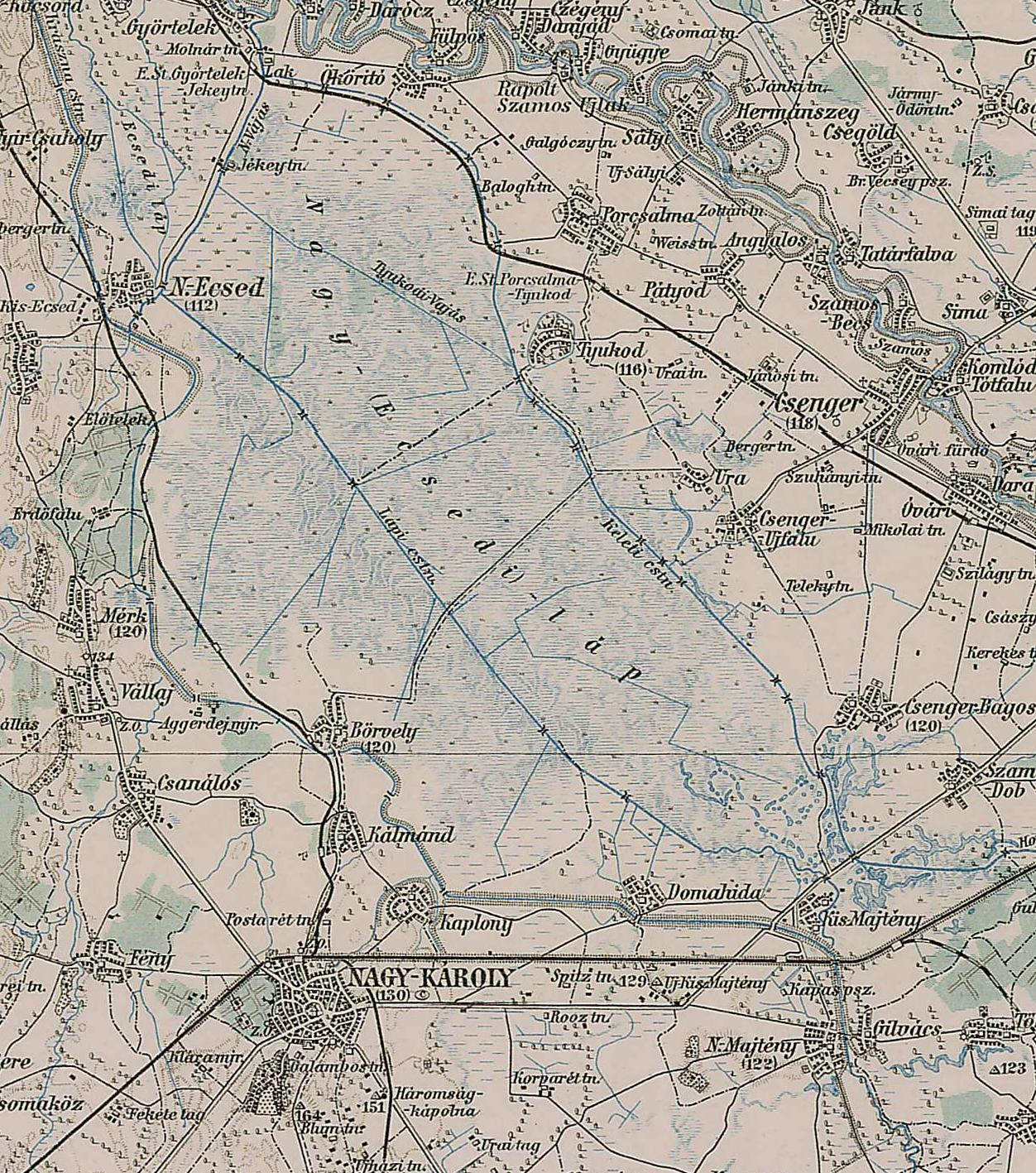 Ecsedi-láp 3. Katonai Térképészeti felmérése Ausztria-Magyarország